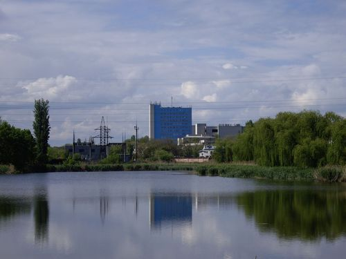 Верхний пруд на р. Славянка